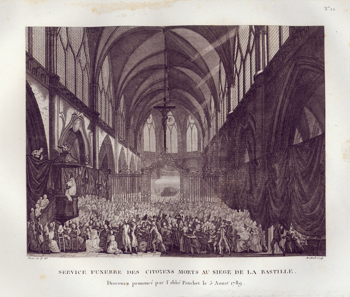 Discours prononcé par l'abbé Fauchet le 5 août 1789, service funèbre des citoyens morts au siège de la Bastille.